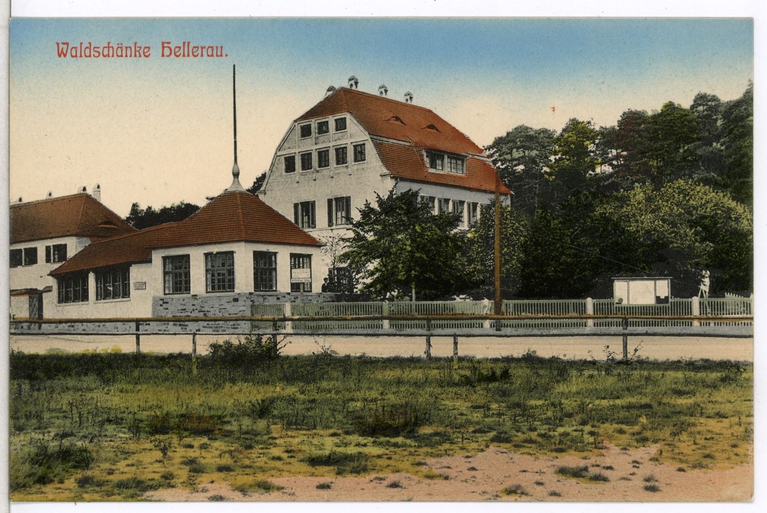 Hellerau; Waldschänke This postcard is from publisher Brück & Sohn in Meißen ( postcard has a unique number 12404 and is available in a higher resolution at the publisher. This images was uploaded in a cooperation project between Wikipedians and the publisher.